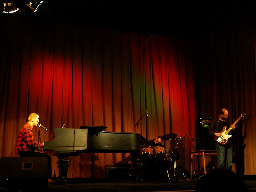 Skupina Psí vojáci na koncertě v Loděnici, 3. prosinec 2010